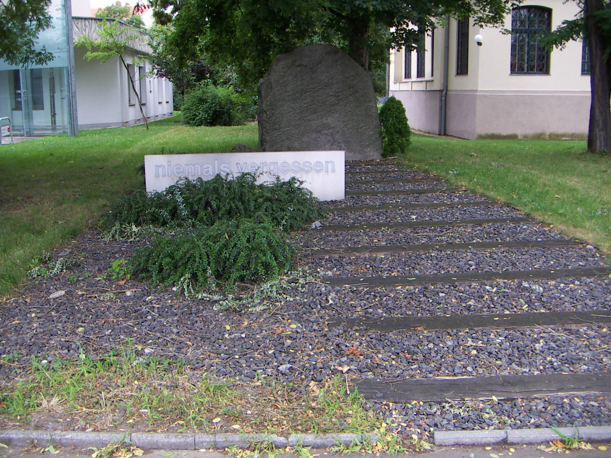 Denkmal Aussenlager Floridsdorf, Konzentrationslager Mauthausen, Prager Str in Floridsdorf Wien